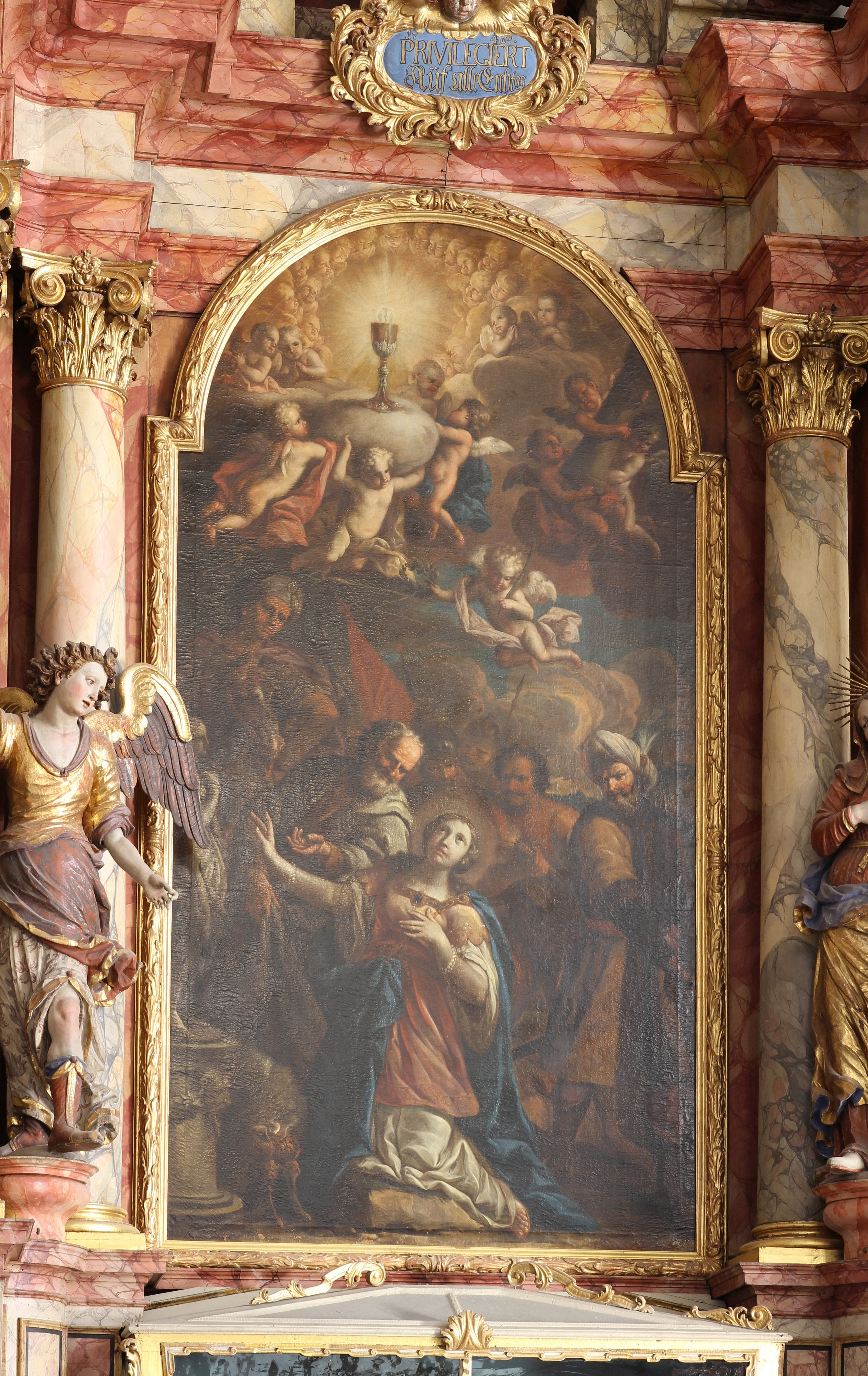 Altarblatt vom rechten Seitenaltar in St. Barbara, Meran